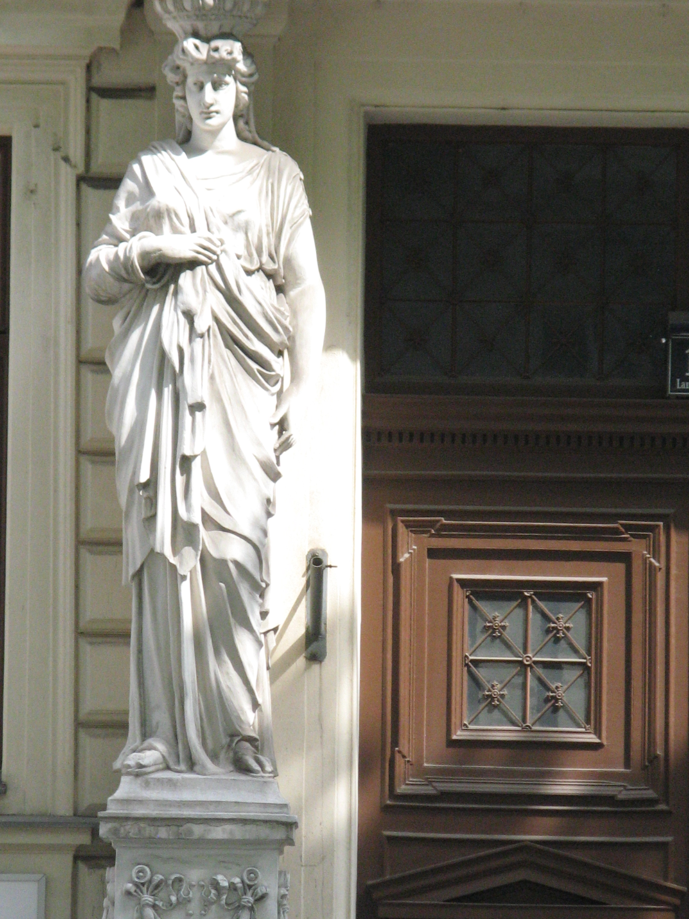 Detail vom Haus Landesgerichtsstraße 18, Wien-Innere Stadt